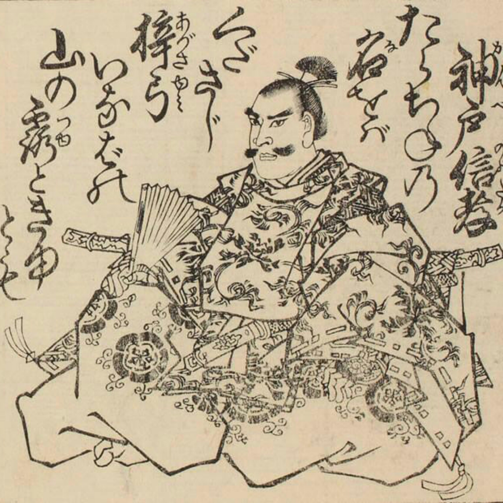 神戸信孝肖像画